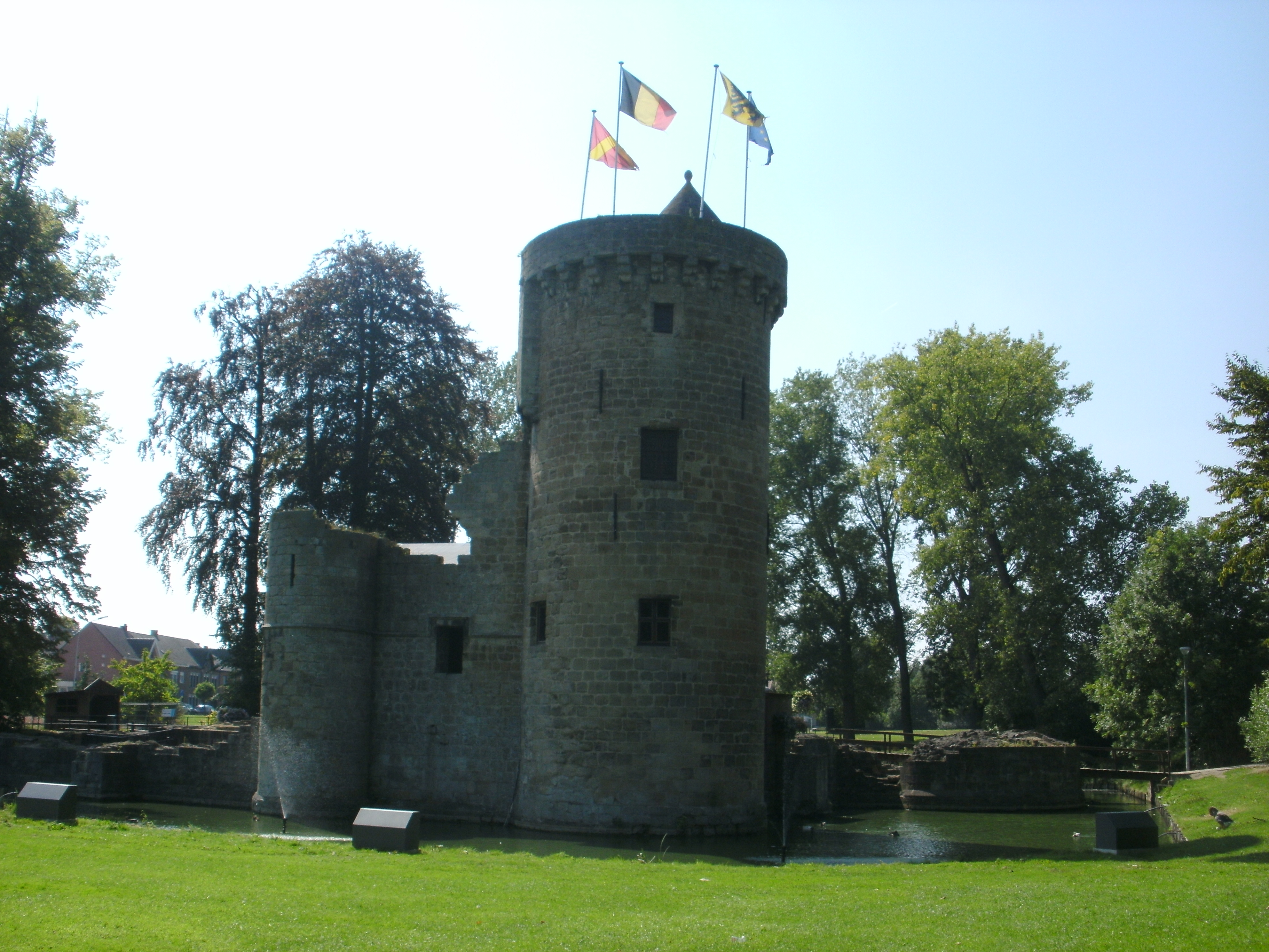 Herzele burcht vooraanzicht